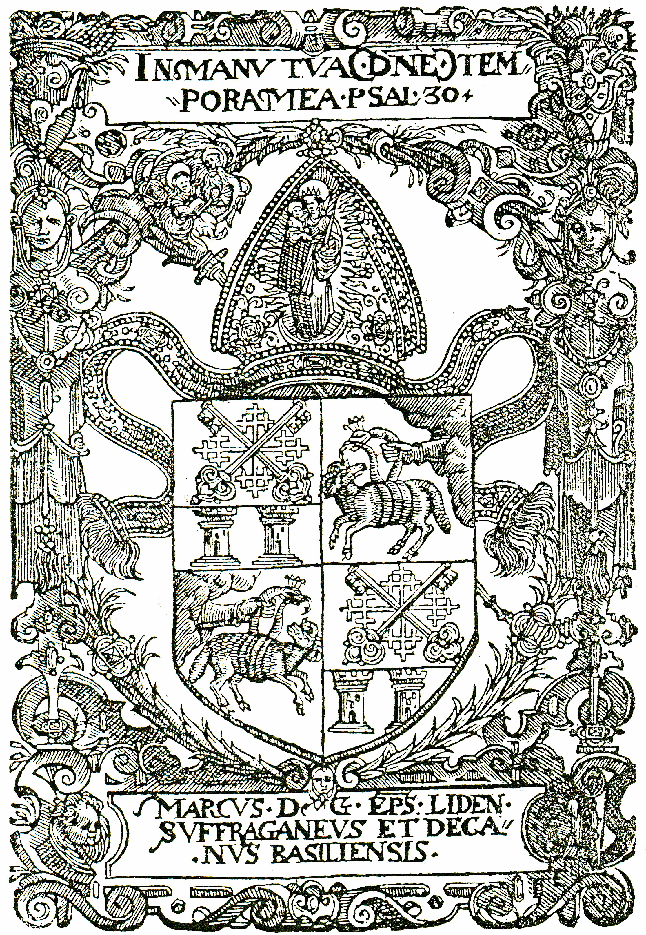 Ex libris (bzw. Schmuckblatt) mit dem Wappen von Markus Tegginger, aus: Beilage zu Wellers Archiv, 1901, Nr. 5, A. Wellers Verlag Kahla